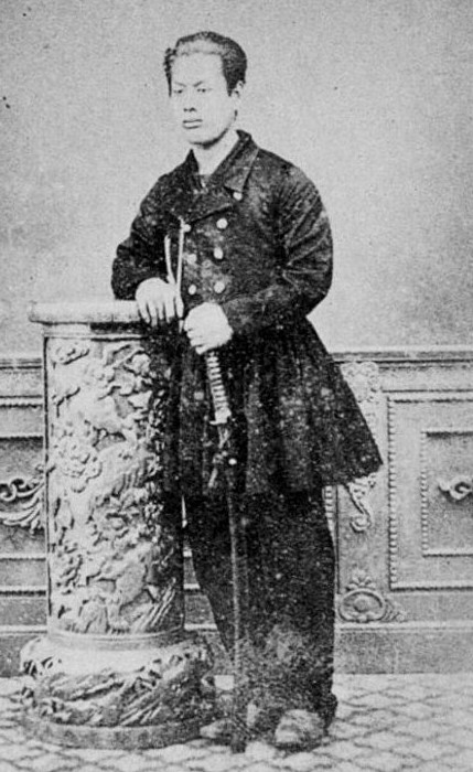 相馬誠胤の肖像写真。